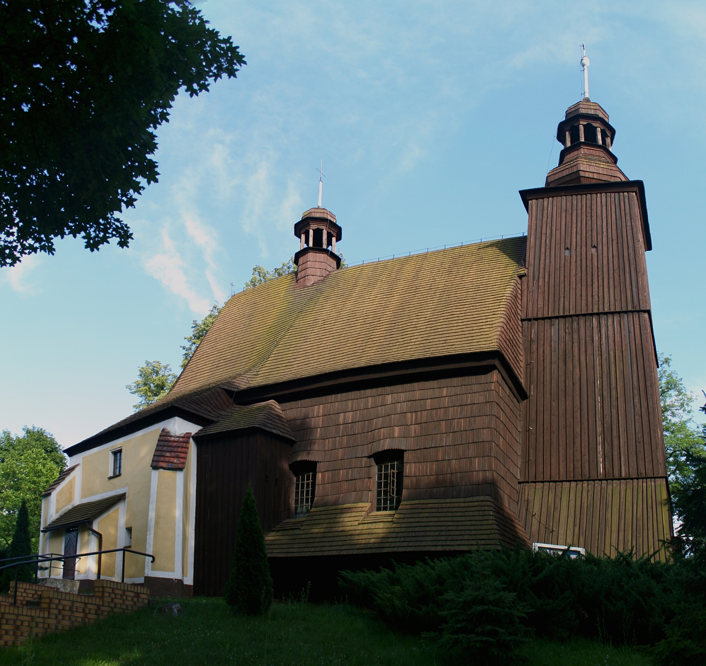 Kościół Wszystkich Świętych w Sierotach